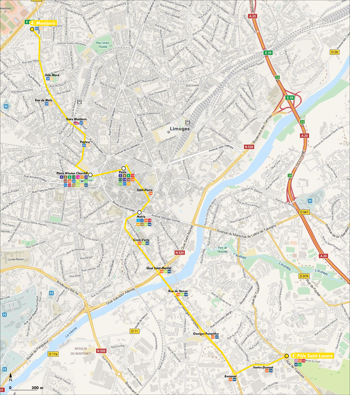 Tracé géographiquement exact de la ligne 4 du trolleybus de Limoges (Haute-Vienne, France)